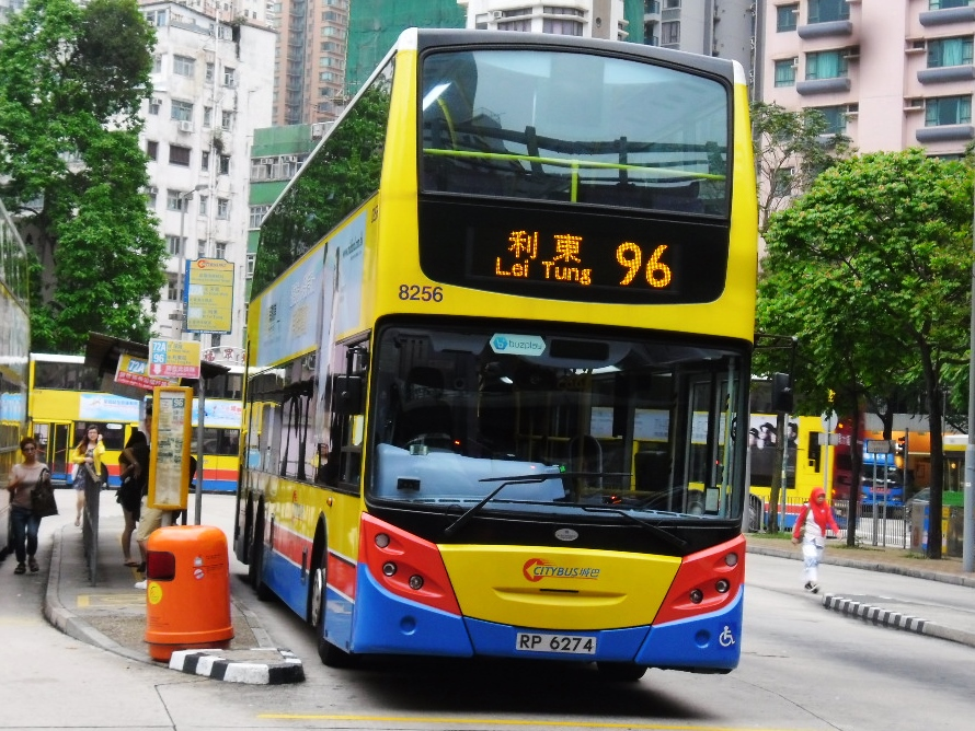 中文（香港）: 城巴96路公車，以銅鑼灣摩頓台為總站